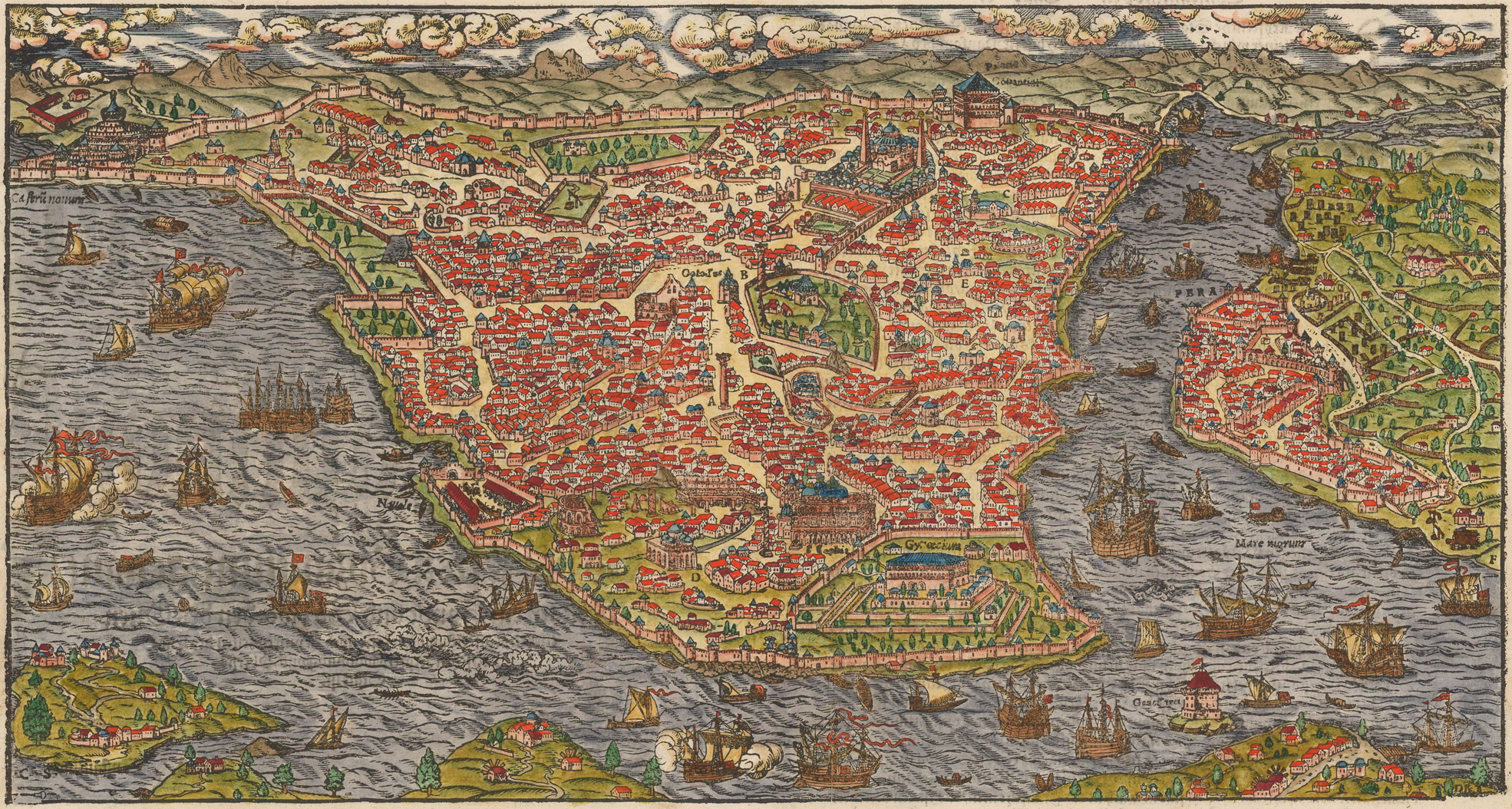 Constantinople from Cosmographia.